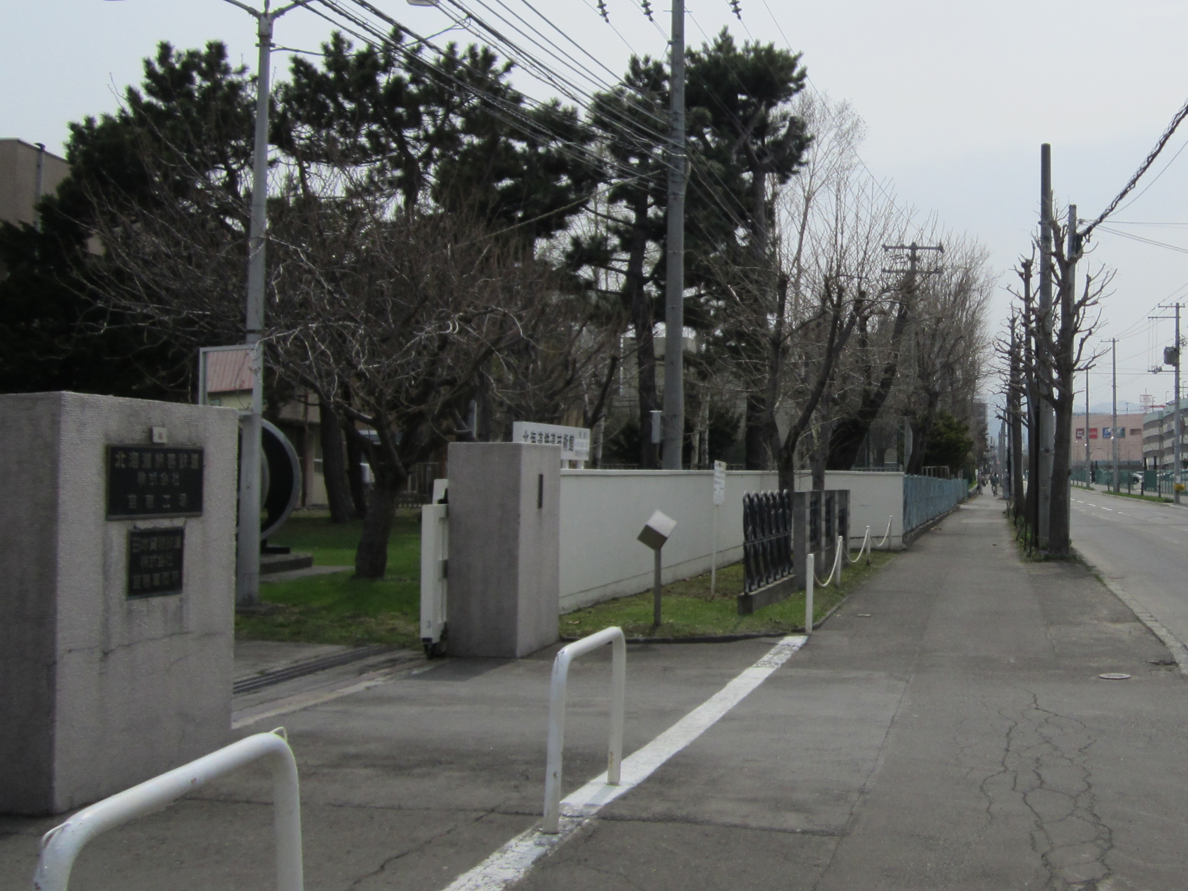 北海道鉄道技術館入口とアリオ札幌の関係